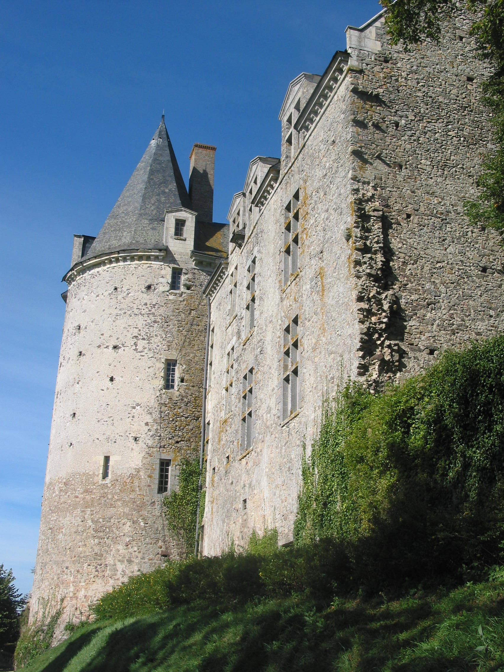 Tour du château de Sainte-Suzanne (Mayenne)